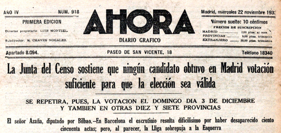 La Junta del Censo sostiene que ningún candidato obtuvo en Madrid votación suficiente para que la elección sea válida